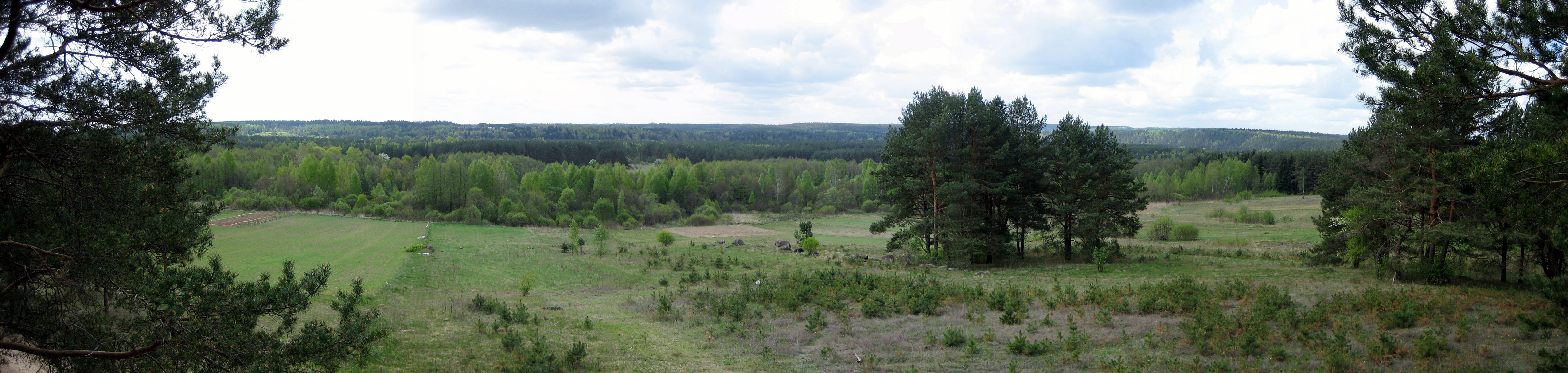 Vaizdas nuo regyklos, įrengtos prie Šilėnų kaimo. Tolumoje dešinėje Stirnių piliakalnis, centre - iš akmenų sudėtas senas žemės sklypų riboženklis